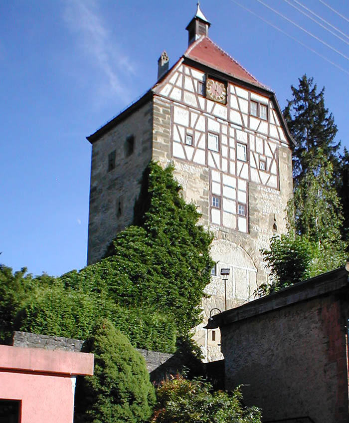 Fünfeckiger Turm ("Hoher Turm") in Neckarbischofsheim